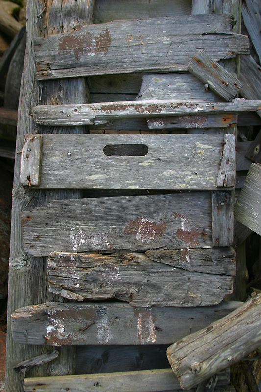 Nimis detaljbild 2003. Foto: Sebastian Vidovic.